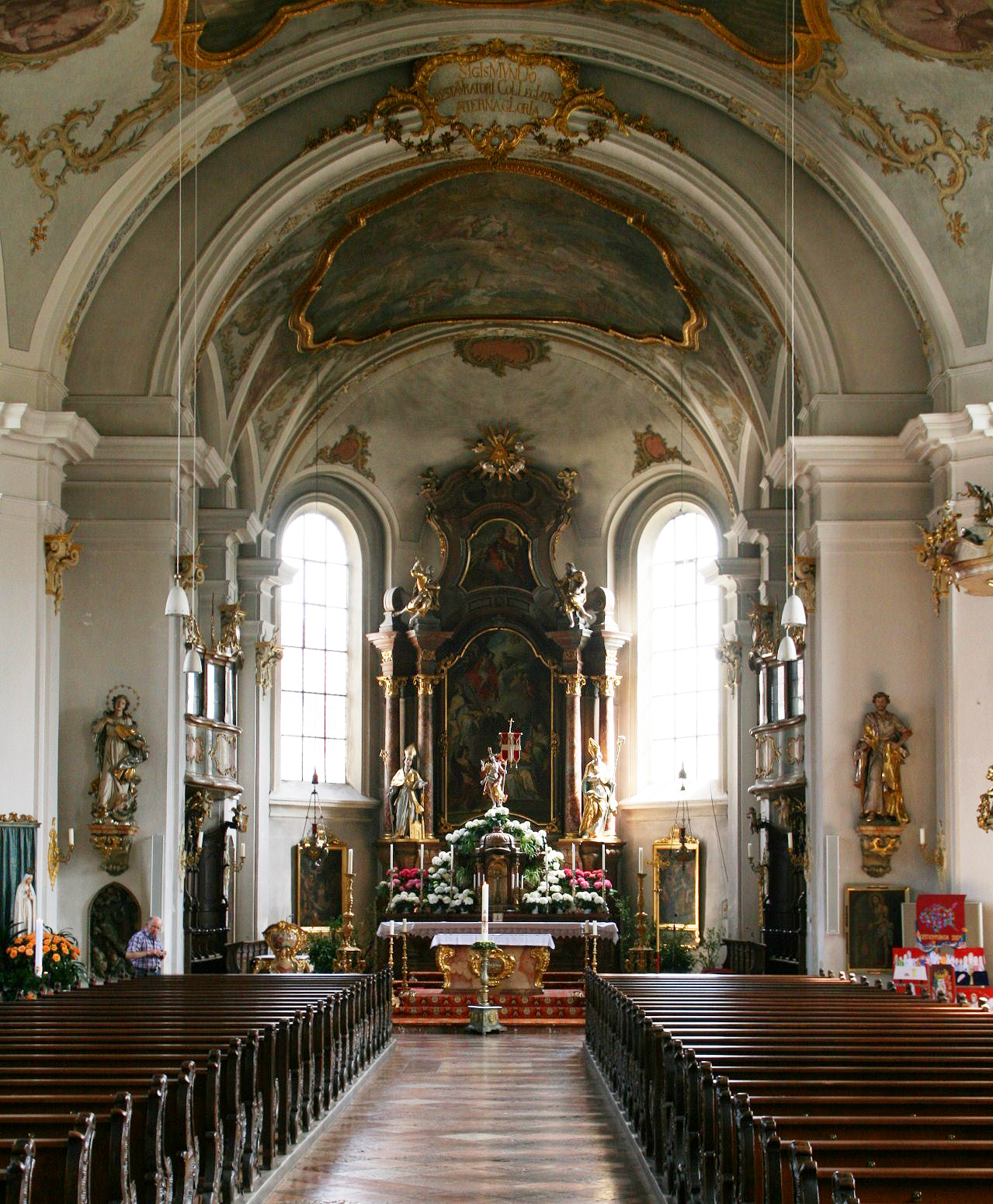 Der Chor von St. Nikolaus, der katholischen Stadtpfarrkirche von Mühldorf am Inn, Landkreis Mühldorf am Inn, Oberbayern. Der ursprünglich spätgotische Chor wurde um 1770 barockisiert. Er birgt unter anderem den barocken Hochaltar von 1774.